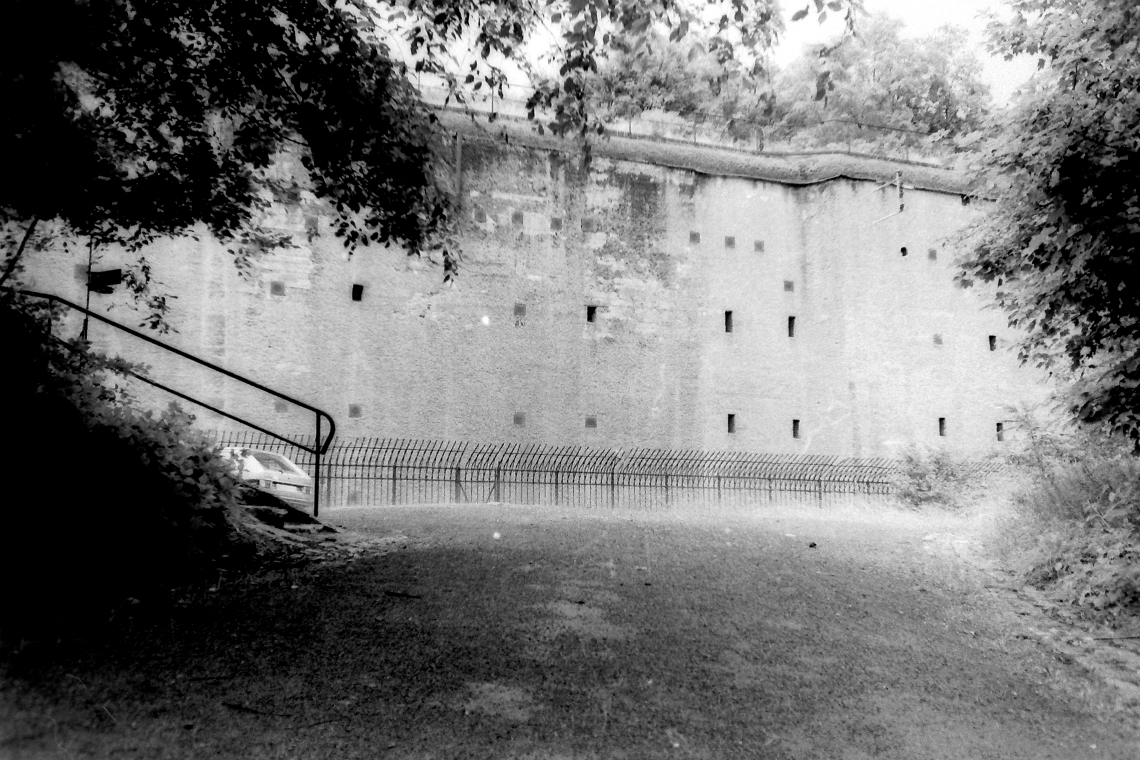 Feste Obergentringen